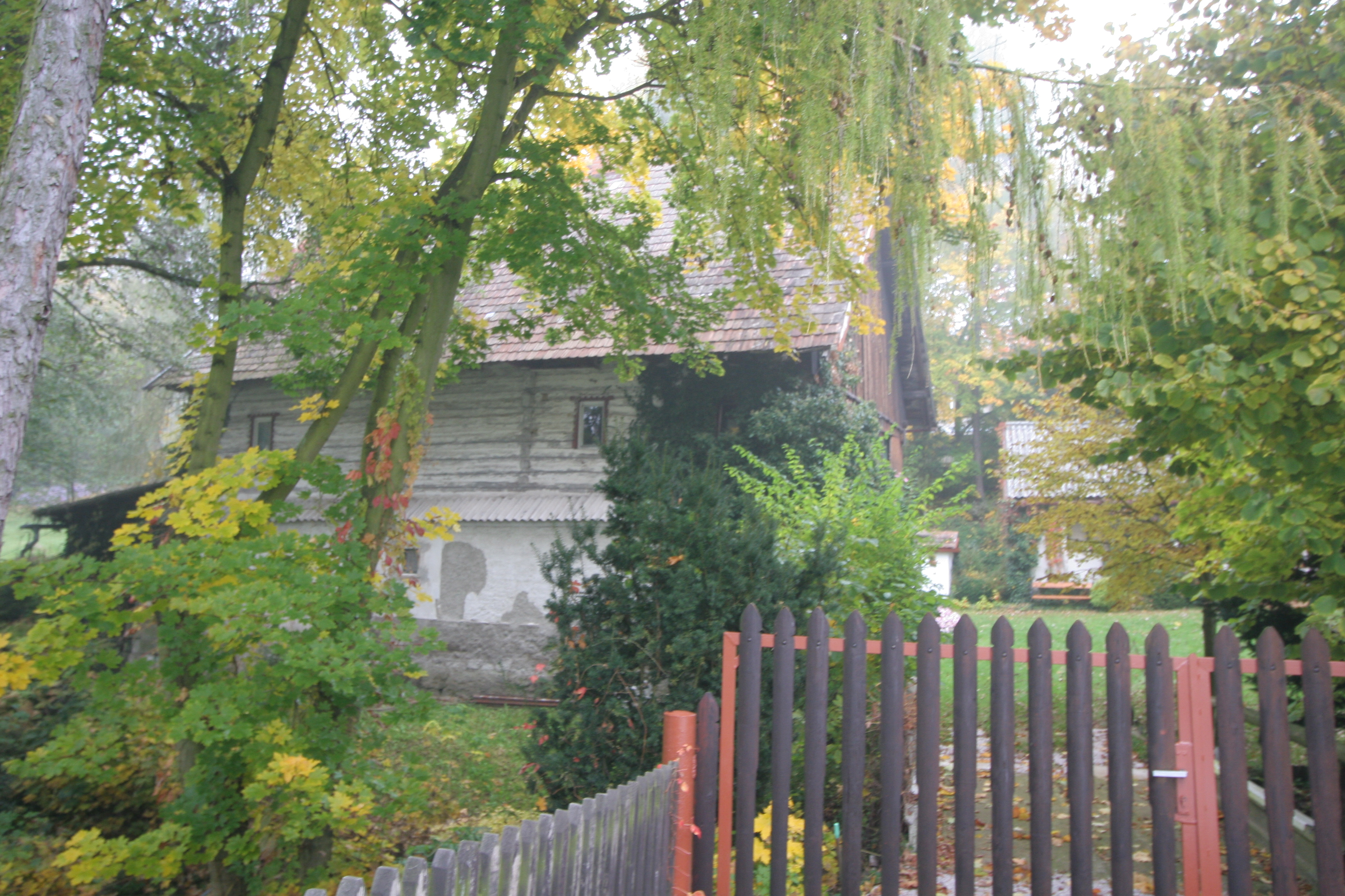 Vodní mlýn (Býšť), Býšť 54